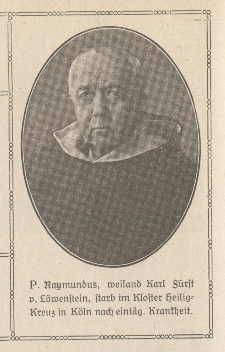 Pater Raymondus Fürst Karl zu Löwenstein